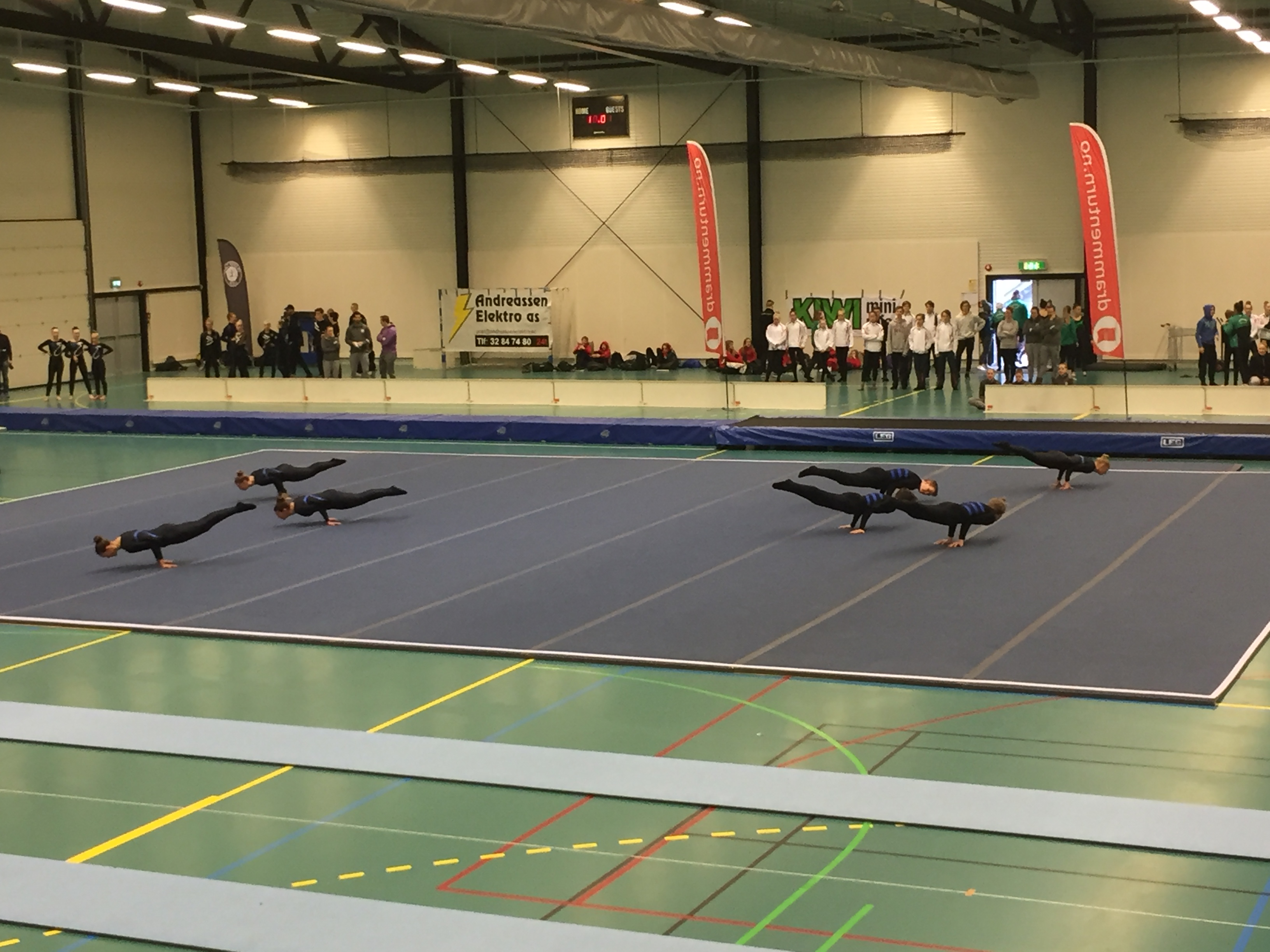 Oslo Turns mixlag i frittstående ved kvalifiseringskonkurransen til NM i troppsgymnastikk nasjonale klasser 2017.